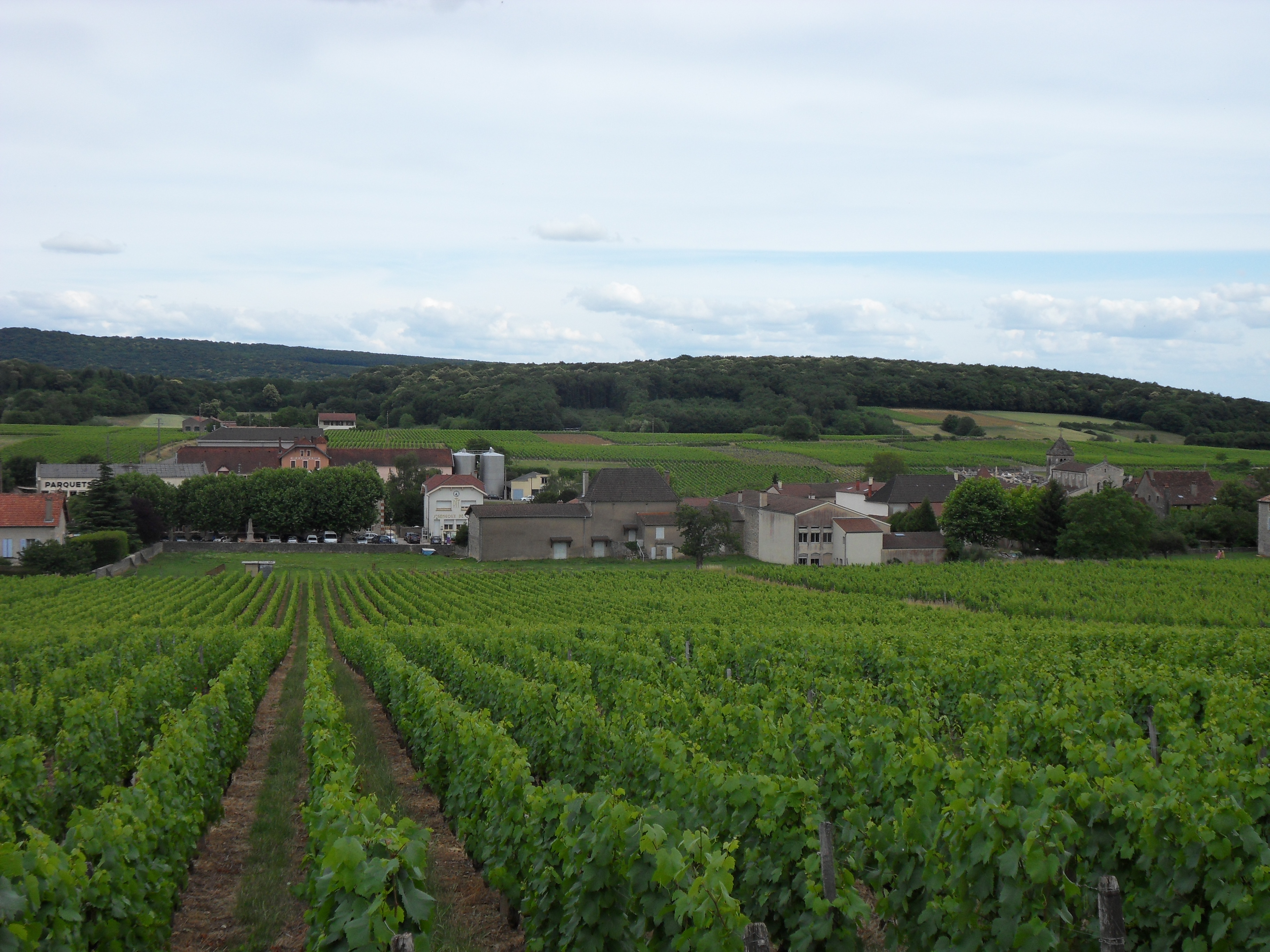 Saint-Gengoux-de-Scissé